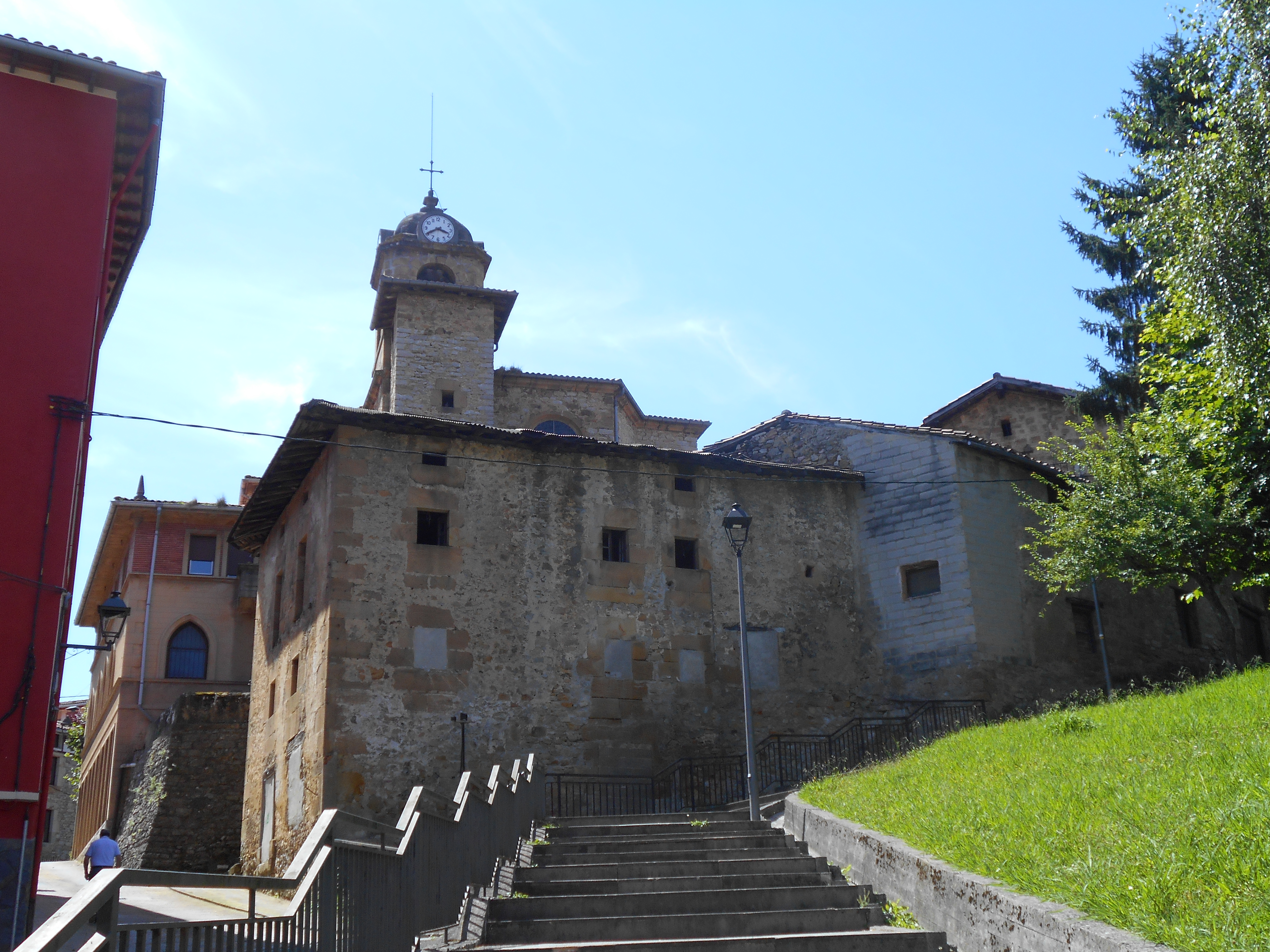 Iglesia de San Andrés